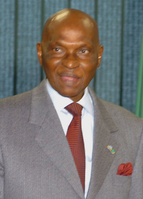 Brasília - O presidente do Senegal Abdoulaye Wade em visita oficial ao Brasil.